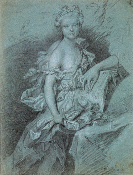 Etude pour le portrait de Madame d’Ecquevilly et ses enfants